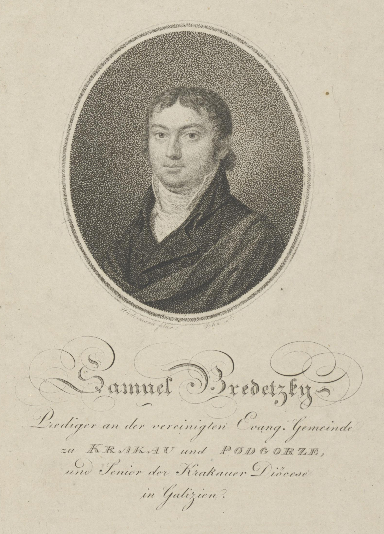 Samuel Bredetzky GND: 116469285